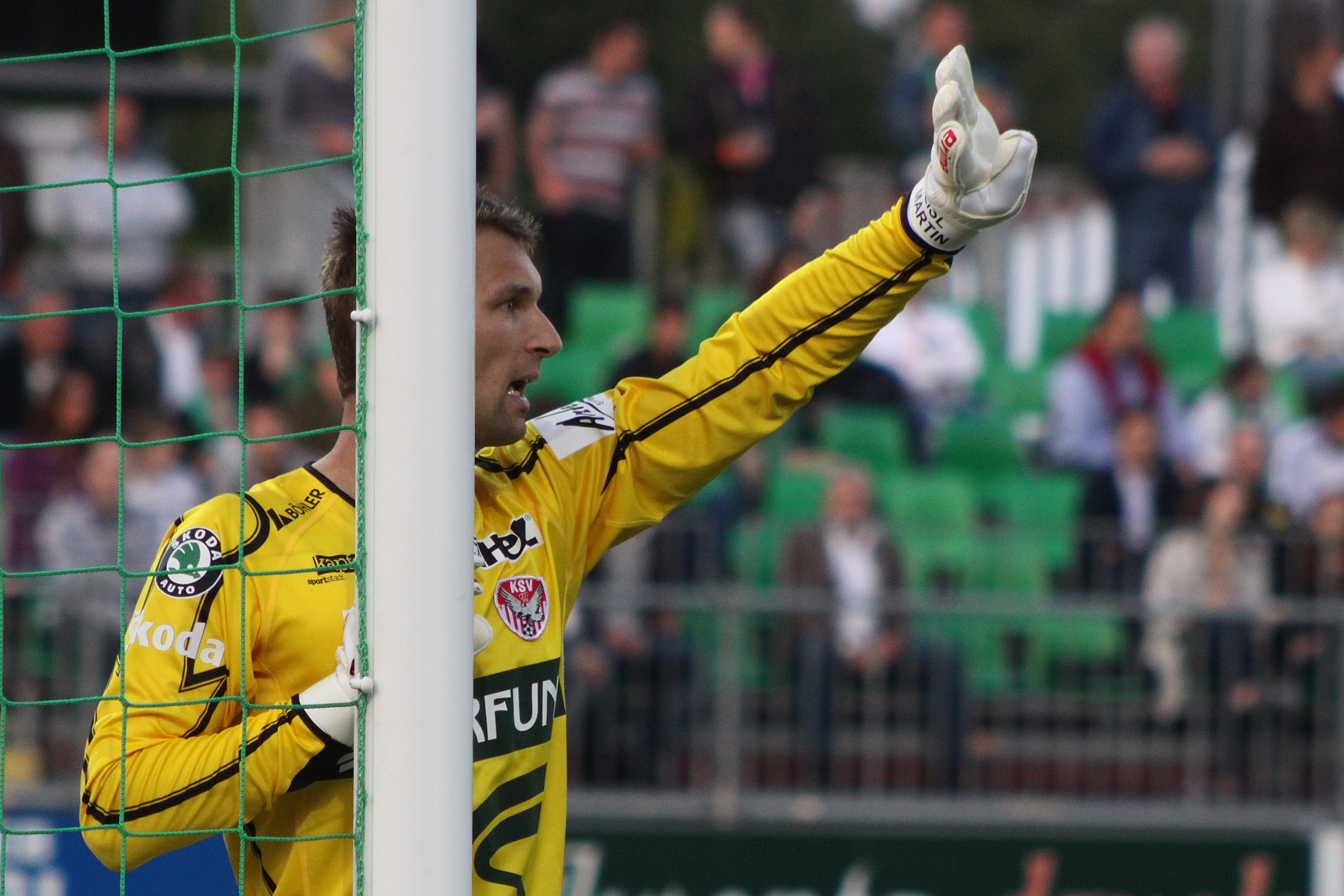 Martin Eisl – Kapfenberger SV (quer)